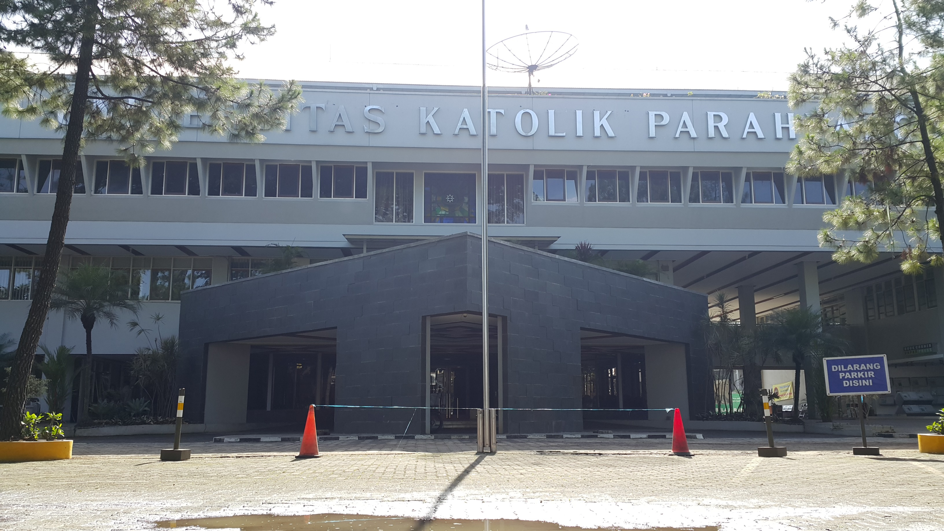 Kampus Unpar Ciumbuleuit